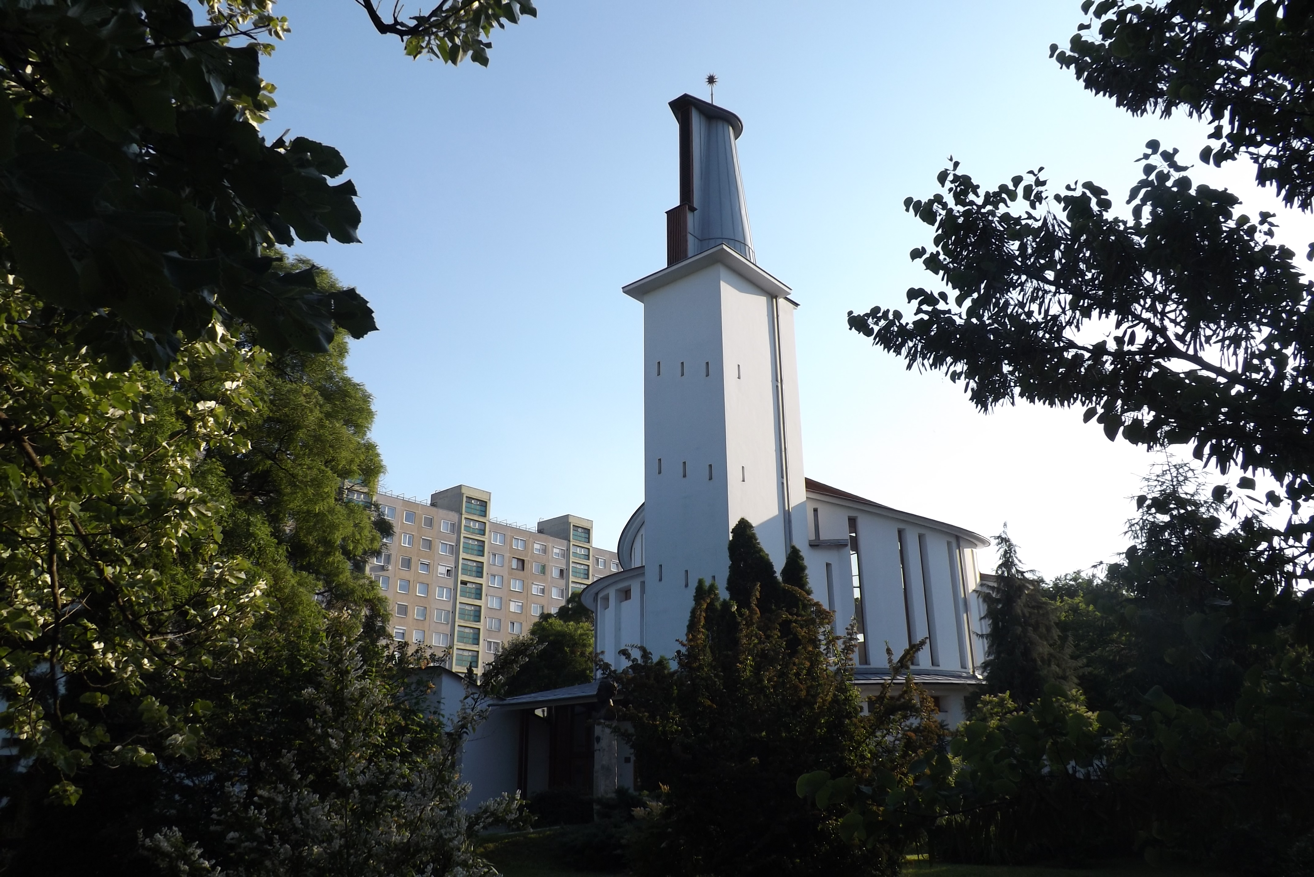 Tócóskerti Református templom, (Debrecen-Széchenyi kerti Református Egyházközség temploma) Az 500 személyes templom felszentelése 1997-ben történt. Debrecen, Tócóskert, István Király utca.